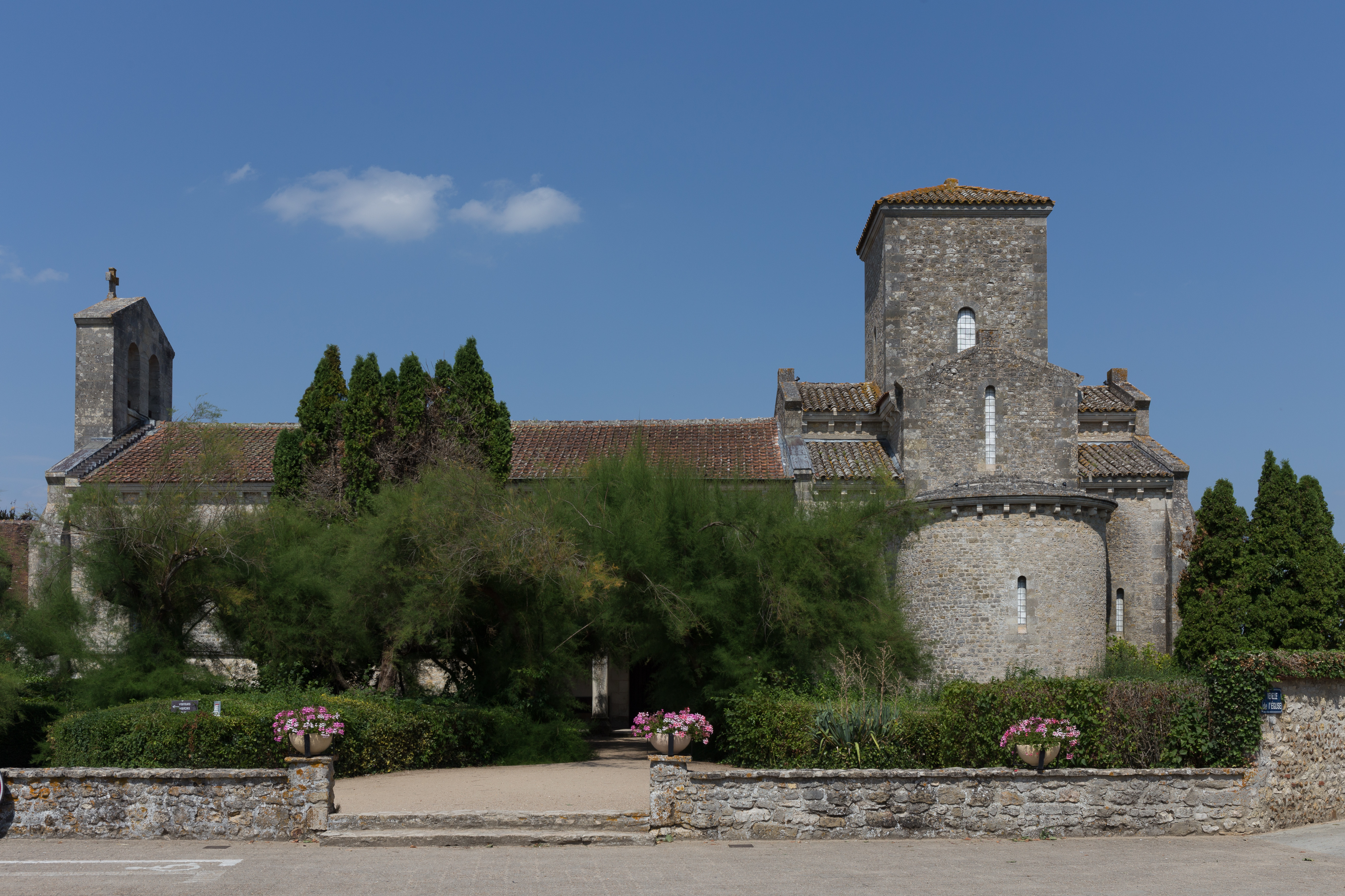 Église de la Très-Sainte-Trinité ou Oratoire carolingien de Germigny-des-Prés : vue d'ensemble. .